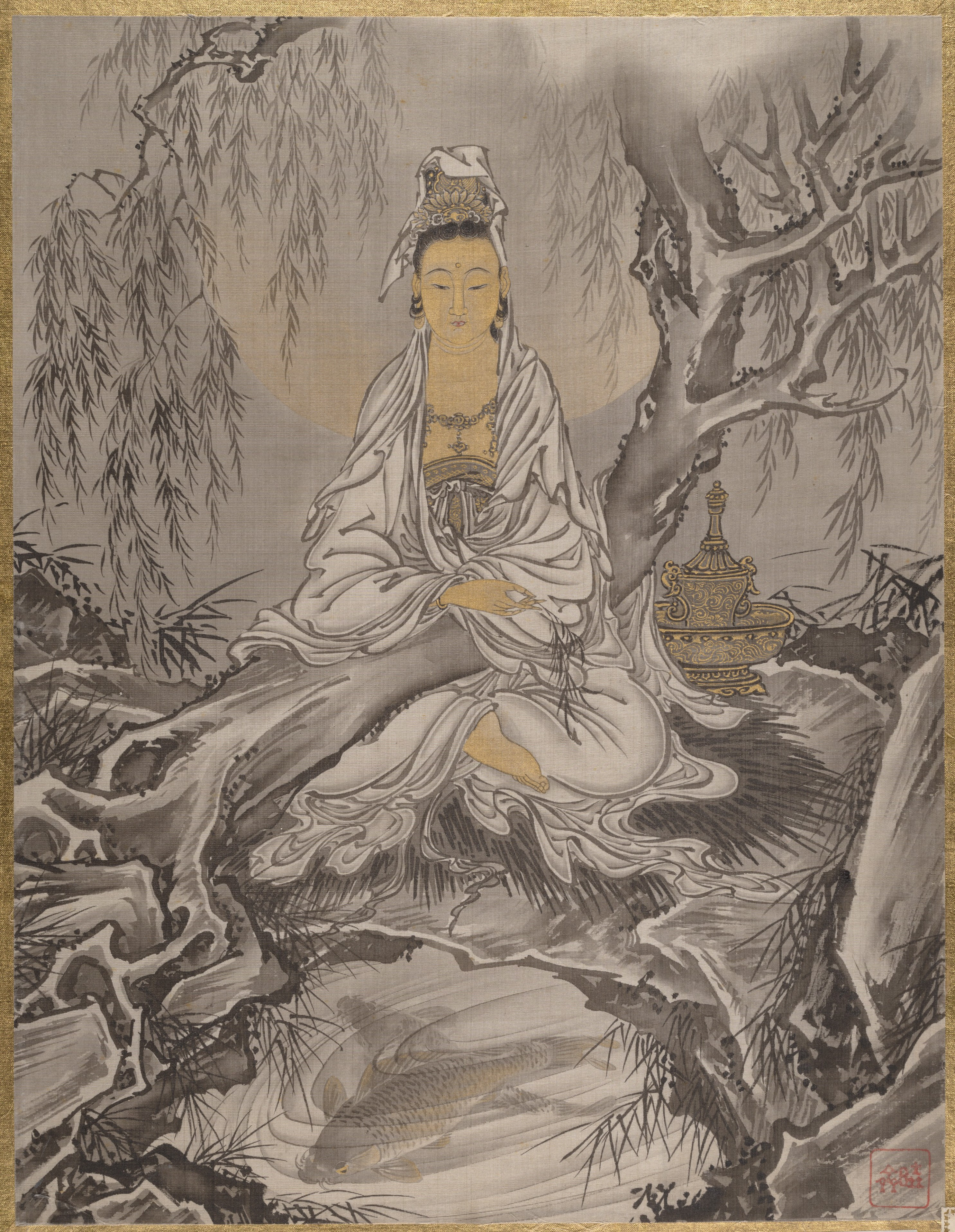 Japan; Album leaf; Paintings